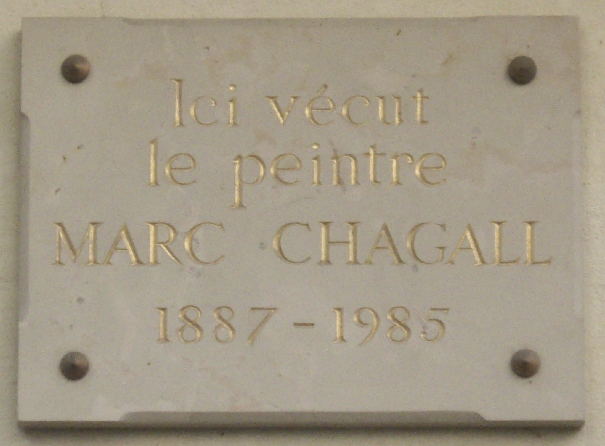 Plaque commémorative, 4 villa Eugène-Manuel, Paris 16e. « Ici vécut le peintre Marc Chagall, 1887-1985. »